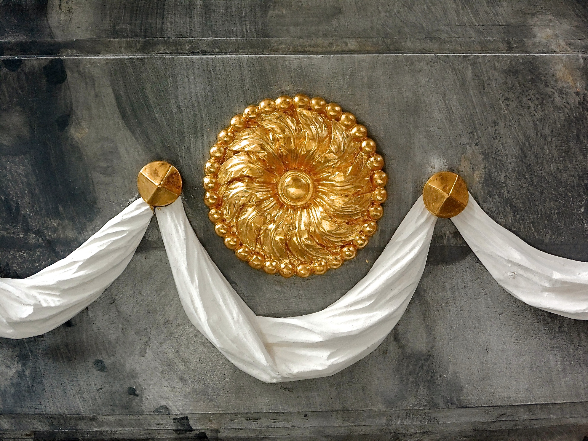 Detail am 2014 restaurierten Altar von 1789; Rosette und Festons